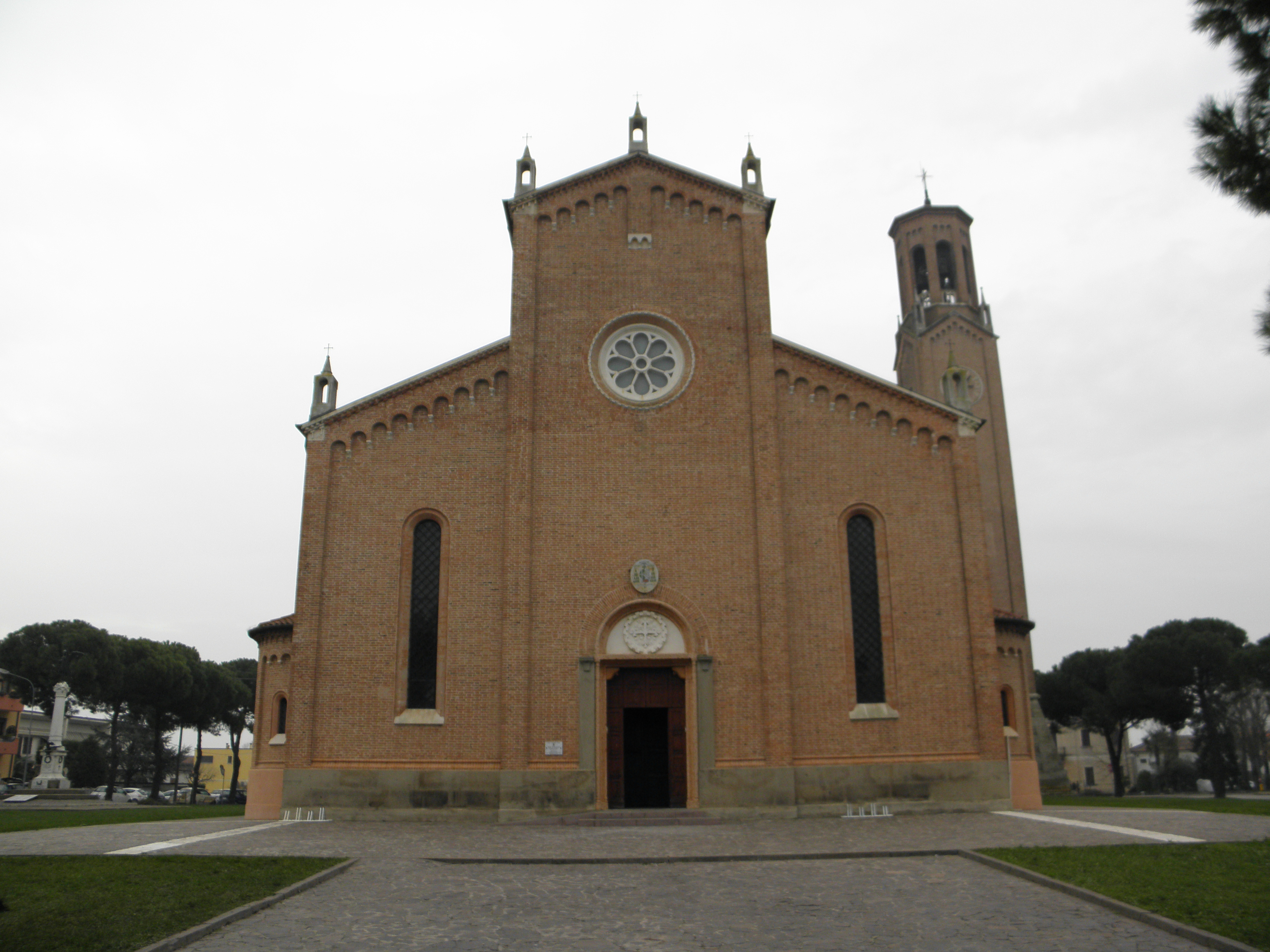 Megliadino San Fidenzio, la chiesa arcipretale di San Fidenzio.